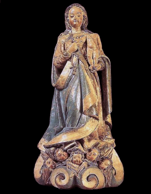 Nossa Senhora do Rosário, século XVII (barro policromado; 42 cm de altura). Frei Agostinho de Jesus (1600/1610, Rio de Janeiro - 1661, ?)